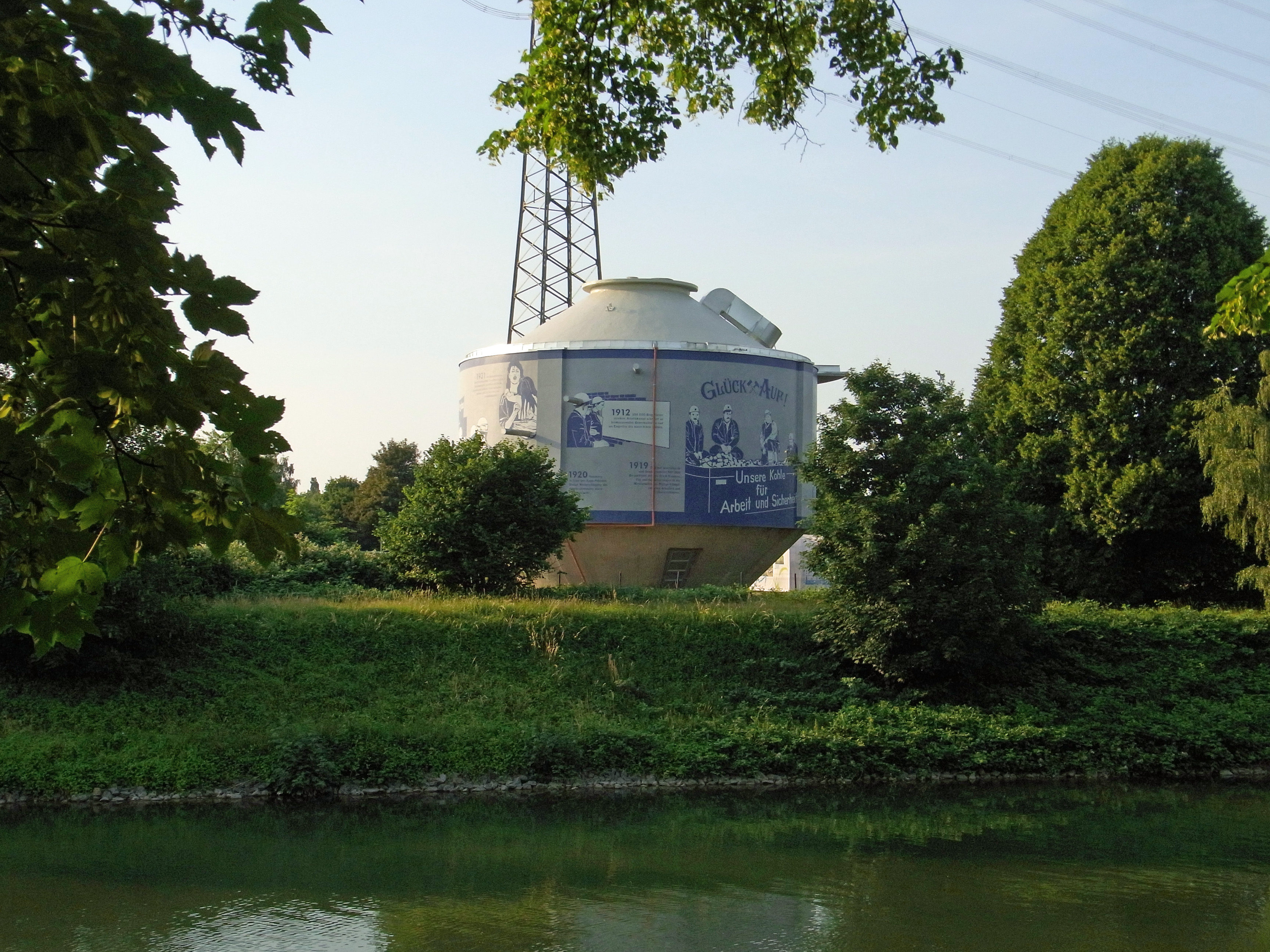 Emscherkunst.2010 Silke Wagner: Glückauf: Arbeiterproteste im Ruhrgebiet - Protestchronik